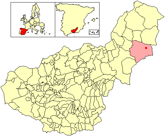 Situación de la localidad de Aguaderico 2º (en el municipio de Cúllar) respecto a la provincia de Granada, en España.